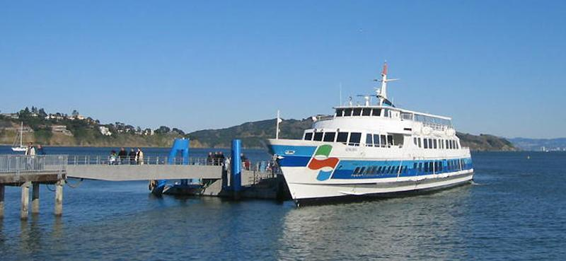 Golden Gate Ferry